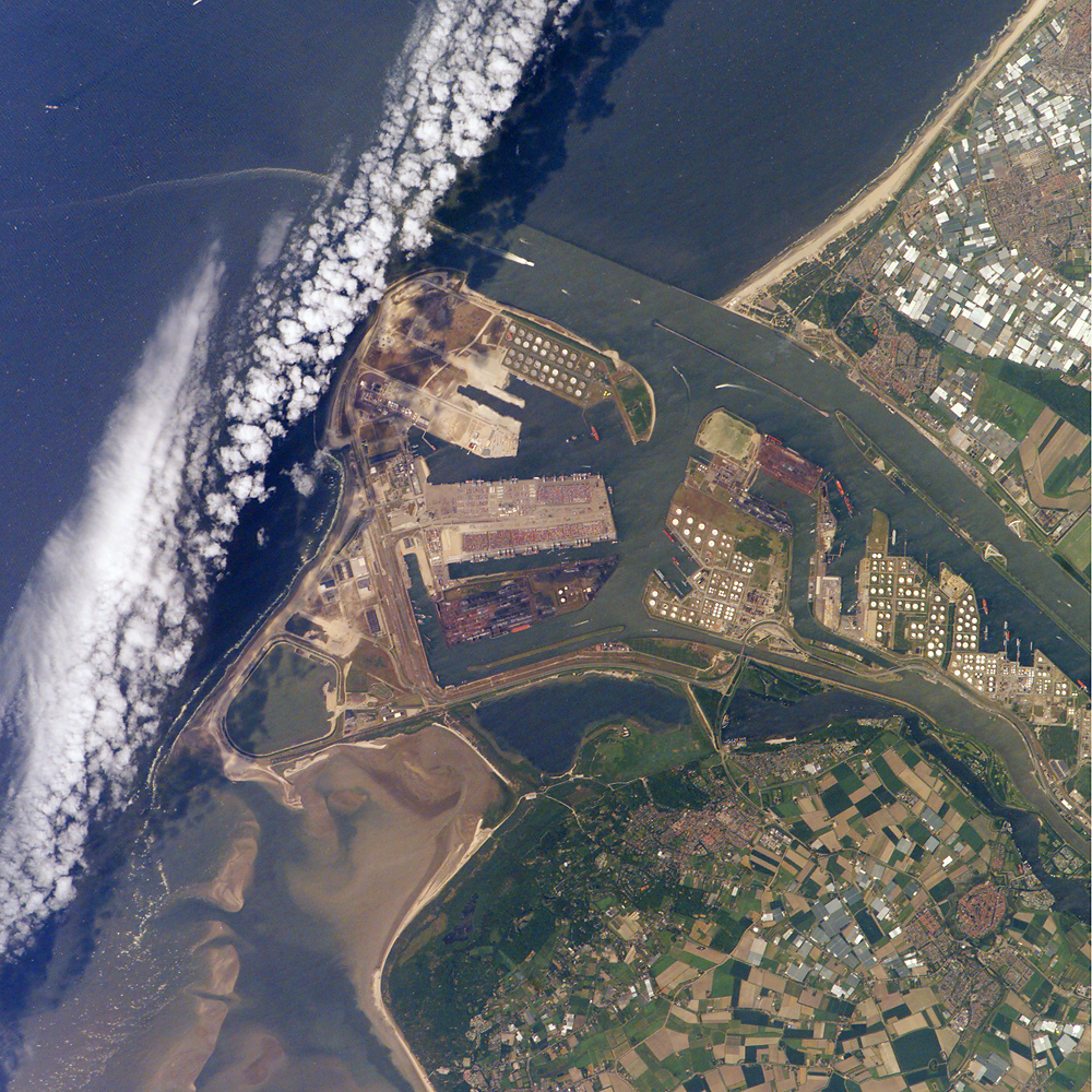 Rotterdamse Haven Europort 28 mei, 2005. Foto NASA